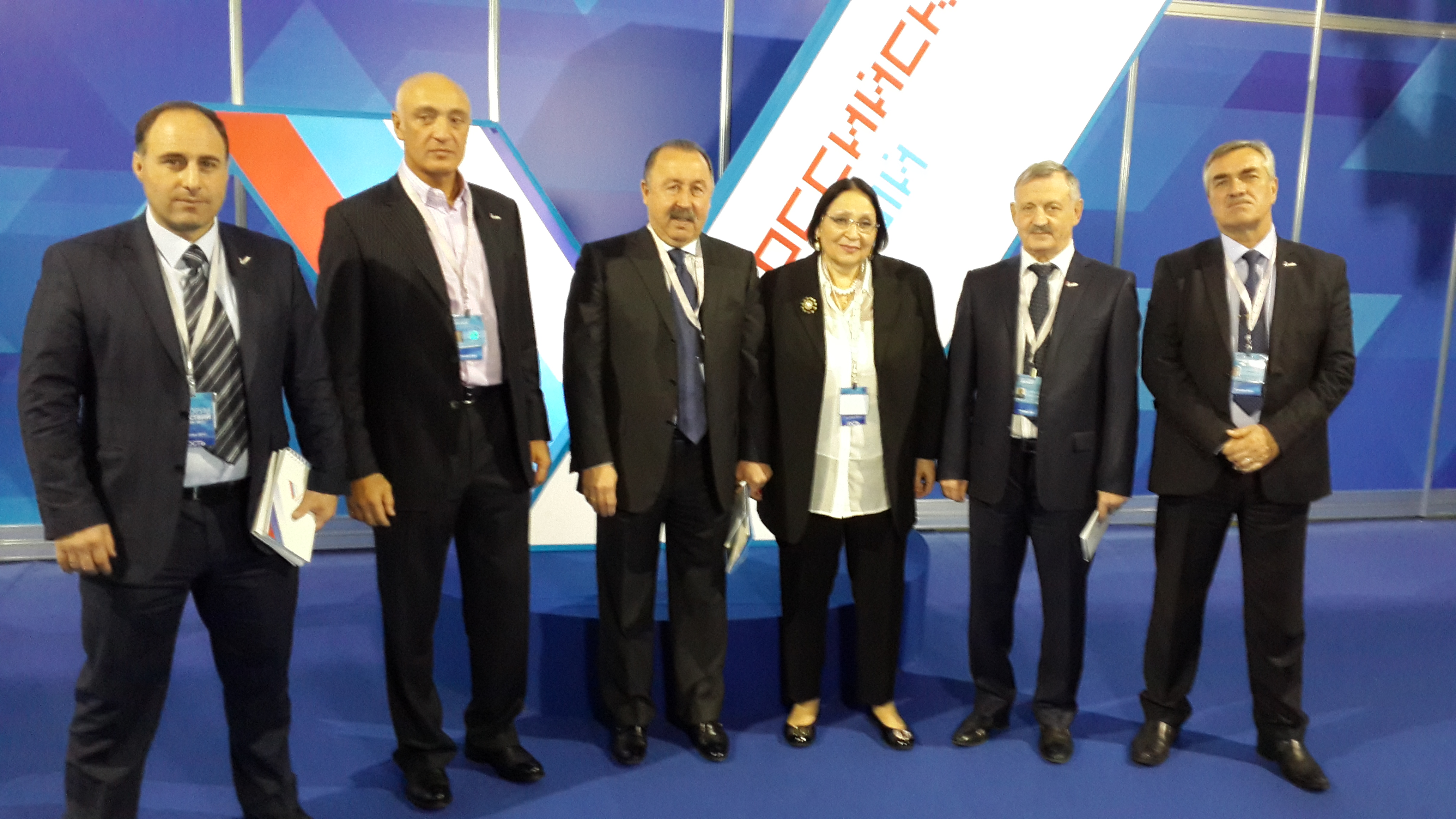 Темина Туаева с коллегами по ОНФ на Съезде, 2014 год